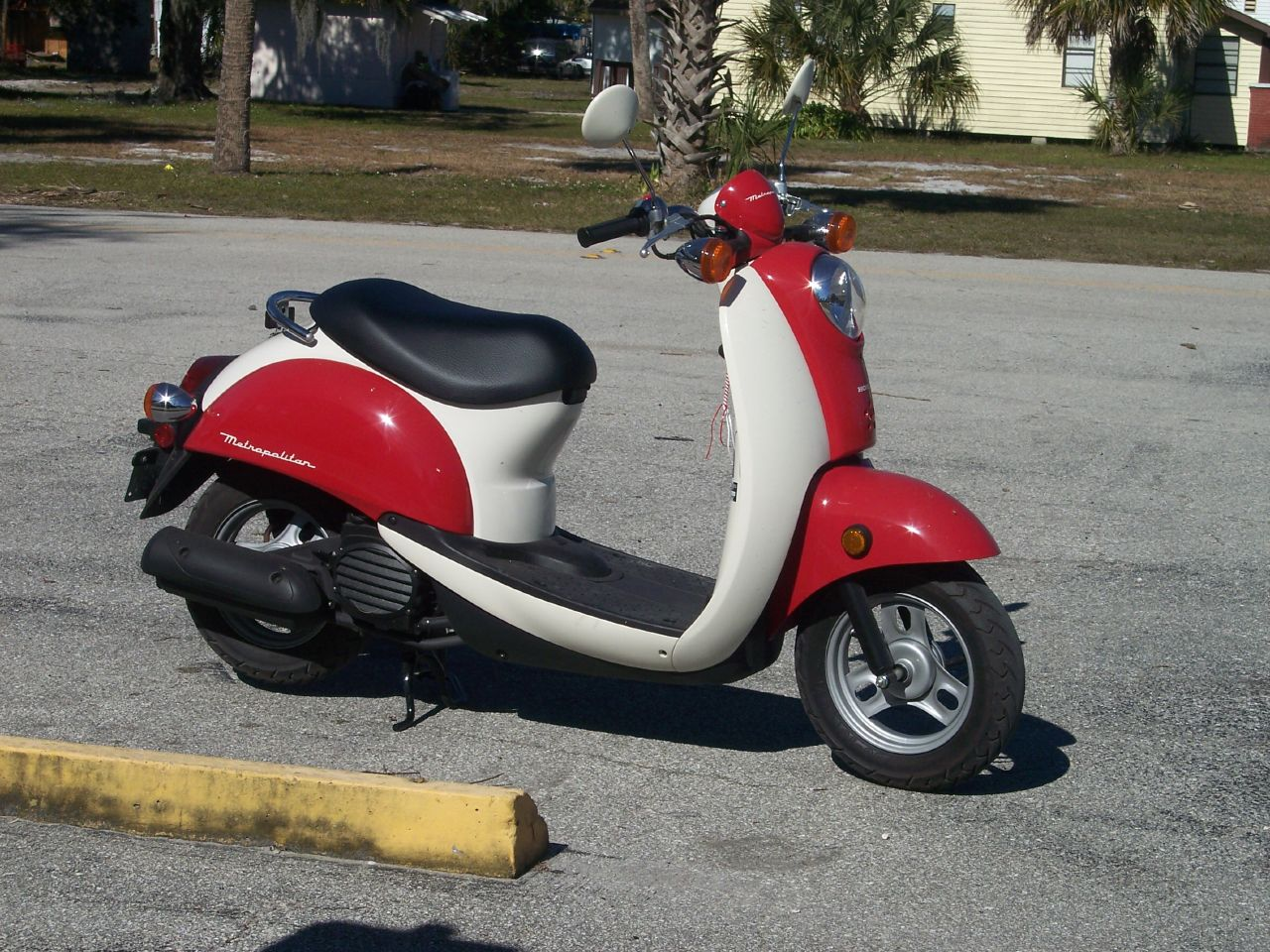 Honda Metropolitan Honda CHF50